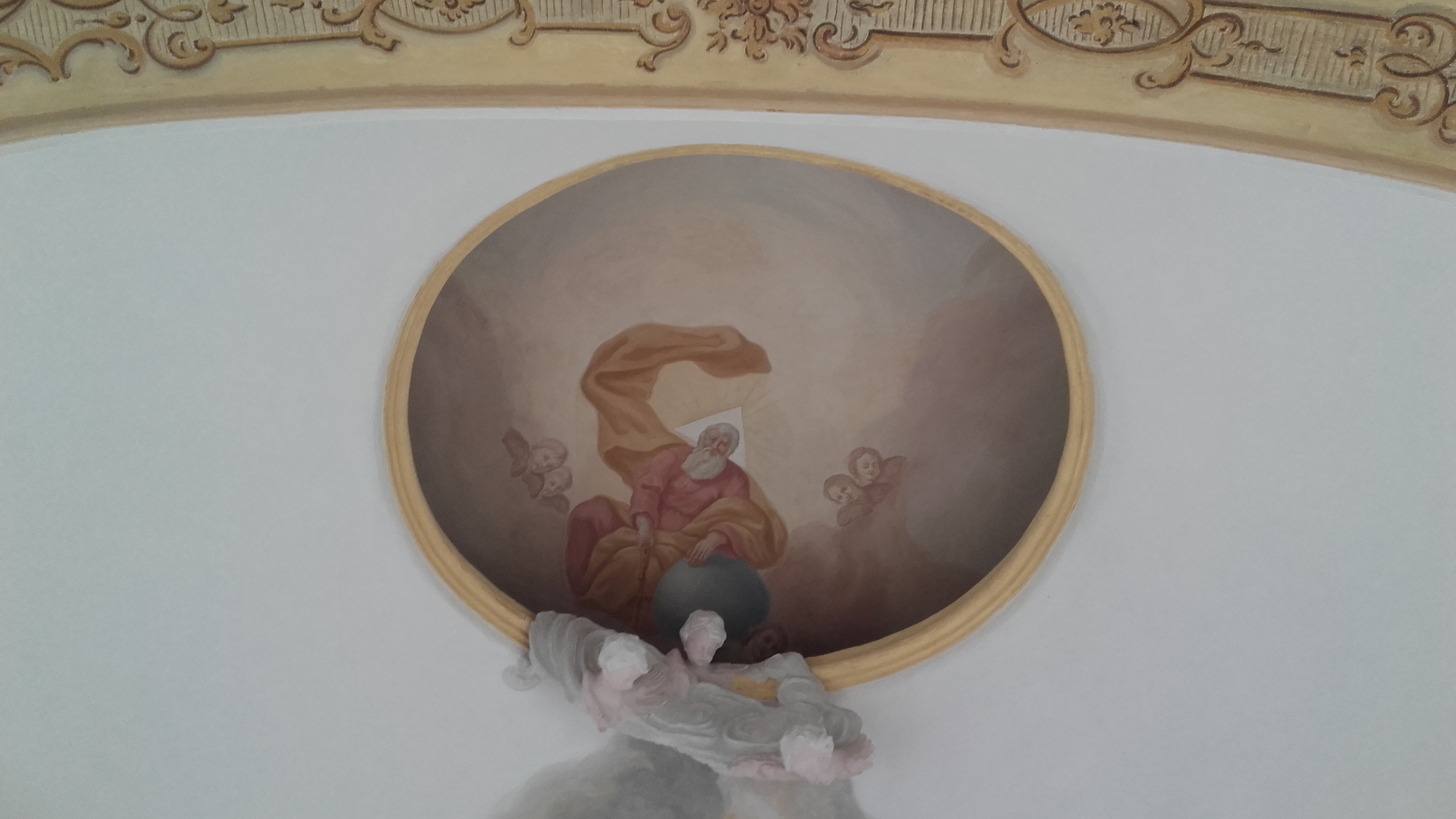 Salzbergkapelle Deckenbild Chor von Sigismund Reis (um 1760)